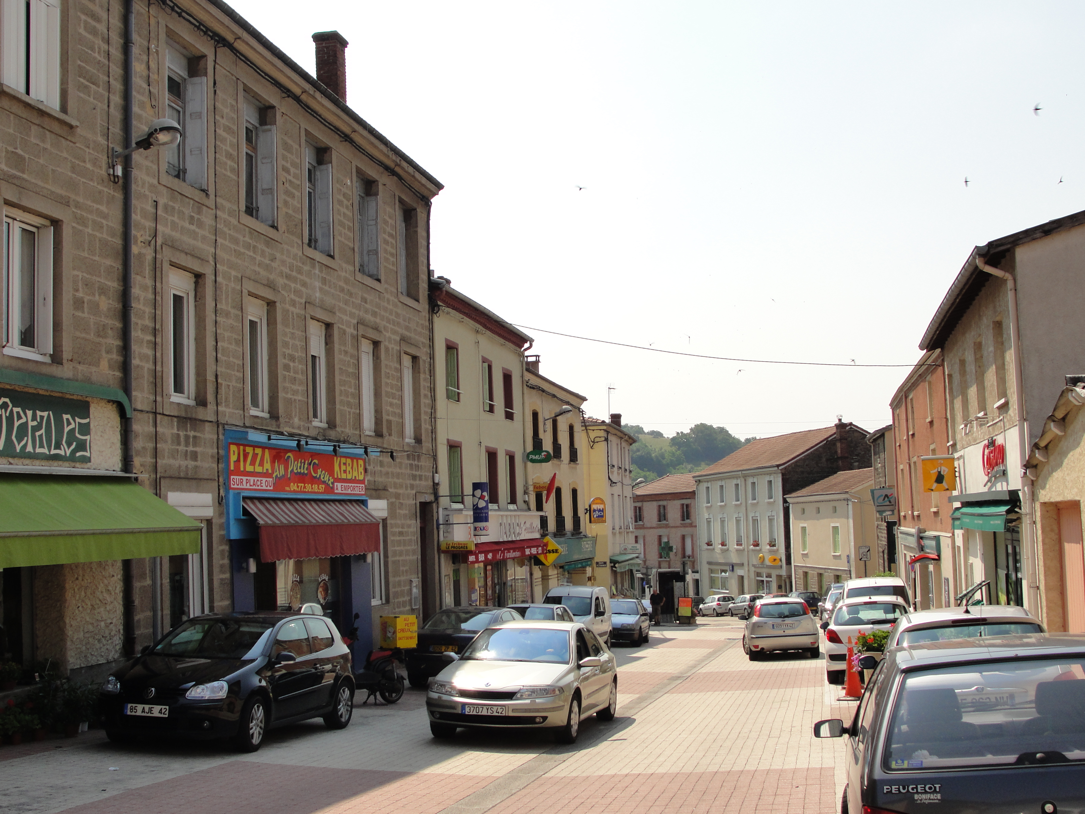 Rue principale de La Fouillouse (Loire).